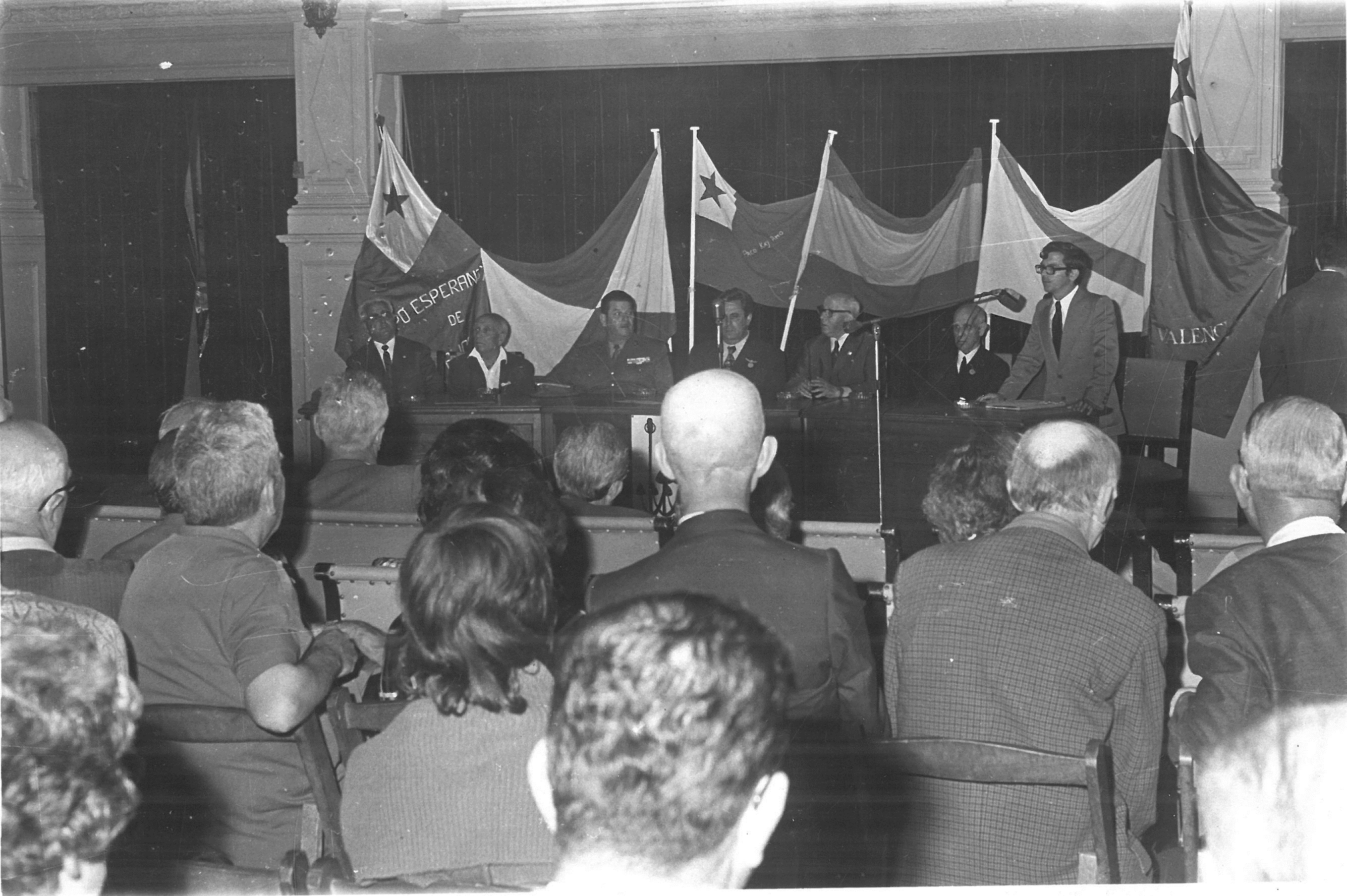 Encerramento do 32º Congresso Espanhol de Esperanto, em Vigo (20-25 de Julho de 1972)